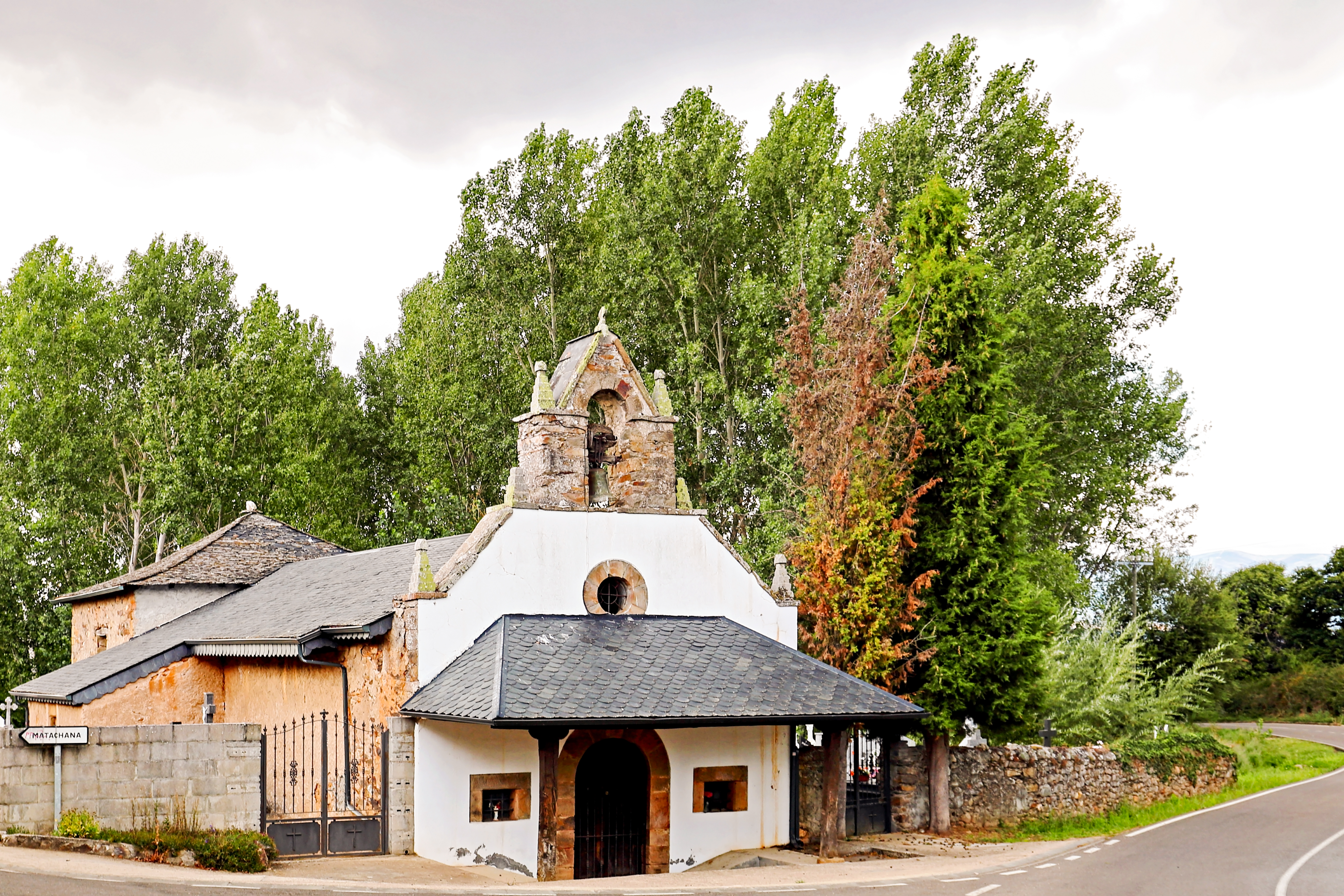 San Pedro Castañero es una localidad que pertenece al municipio de Castropodame en la comarca de El Bierzo, provincia de León.